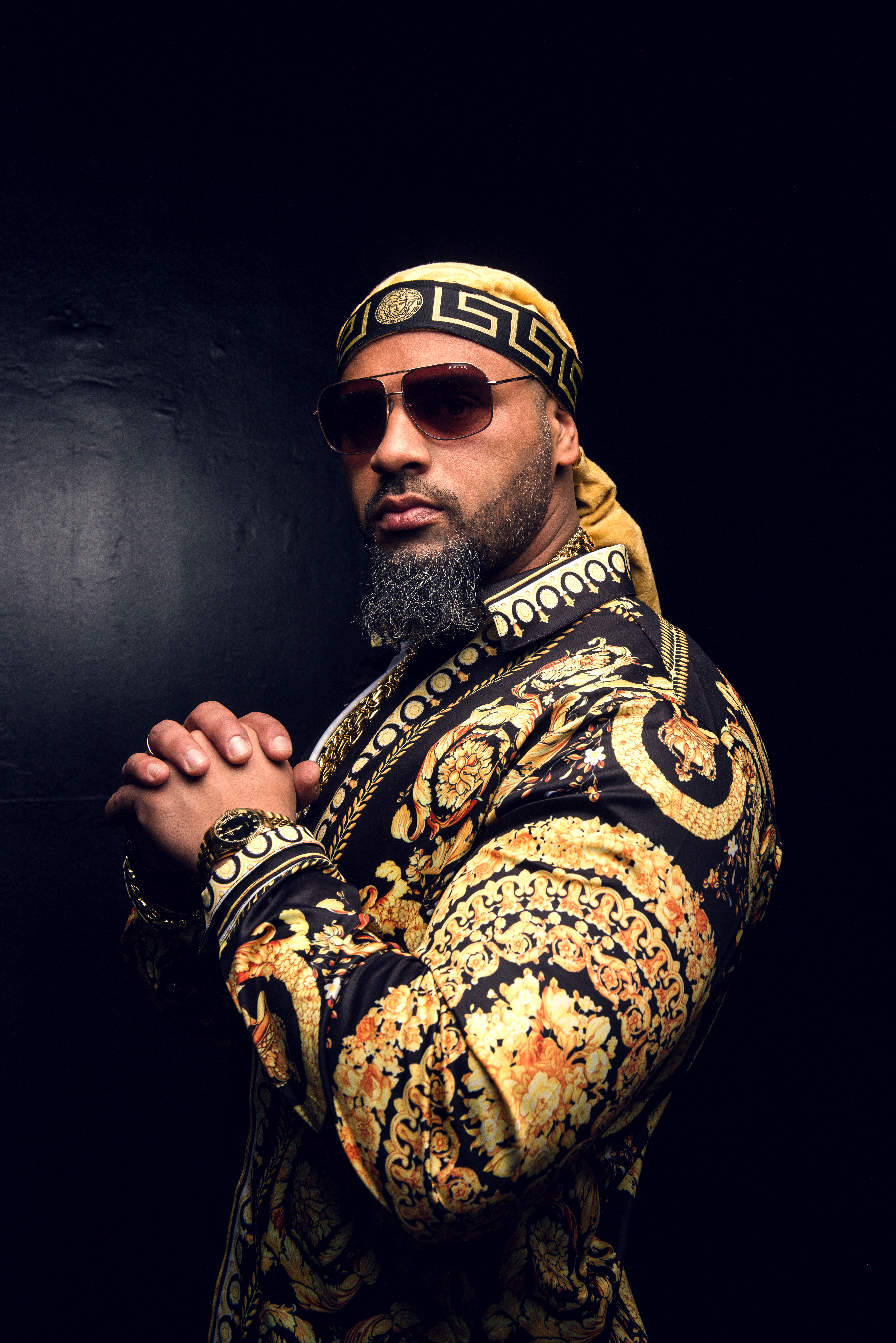 Pressefoto von Massiv